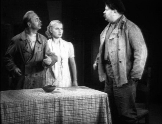 Кадр из фильма Аринка (фильм)